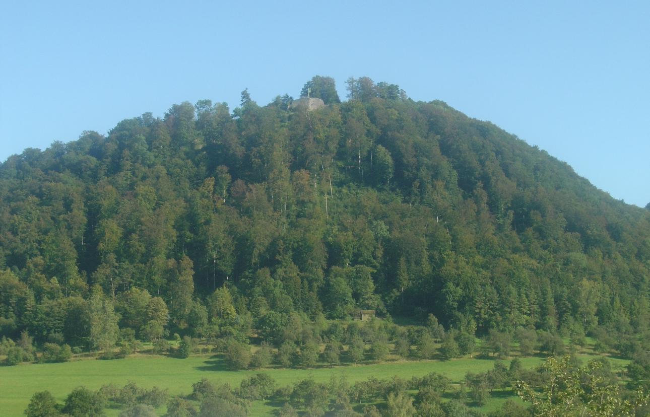 Blick auf die Burgruine Hiltenburg vom Bad Ditzenbacher Wohngebiet Klingenbrunnen